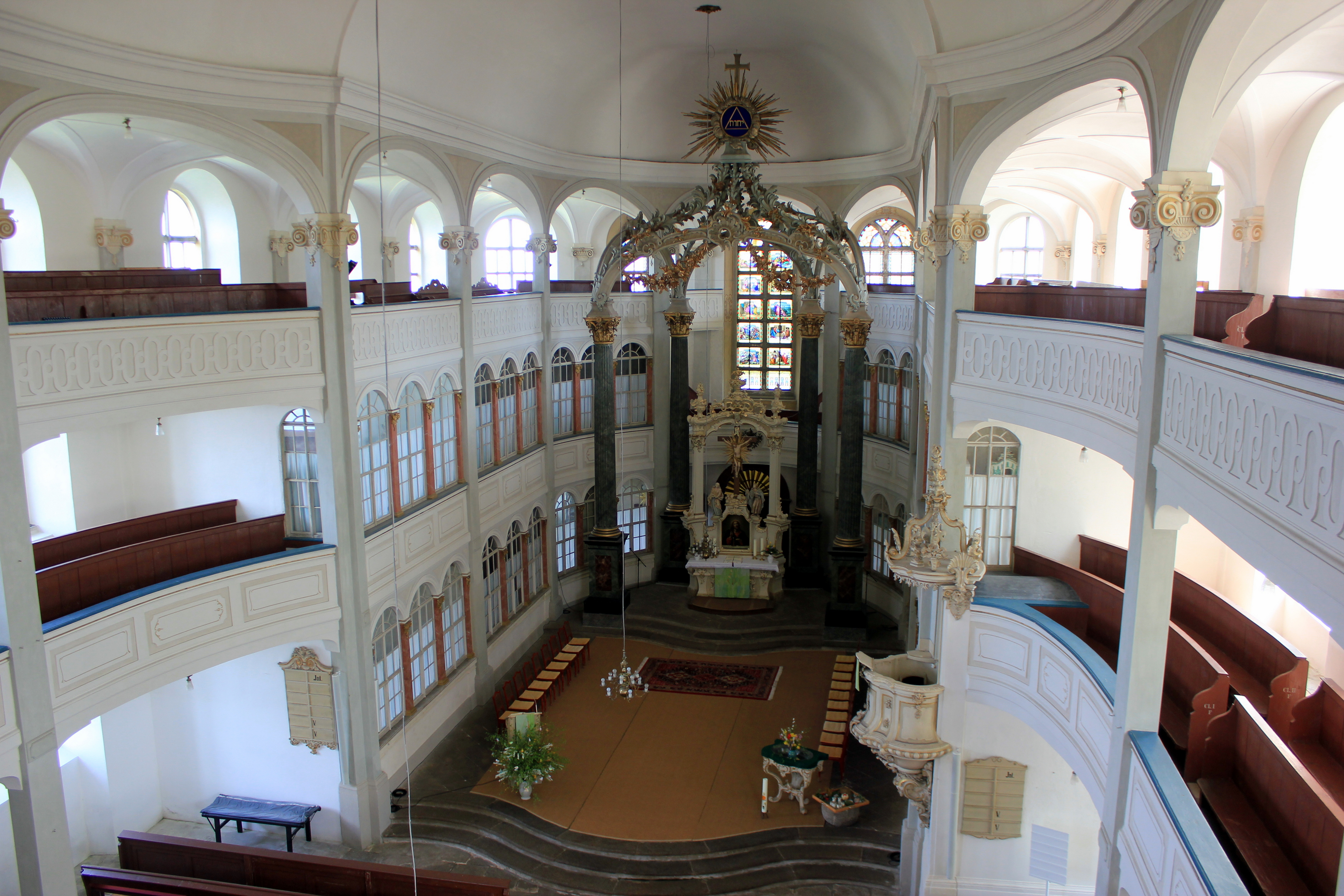 Hornjoserbsce: W Ketličanskej ewangelskej cyrkwi.